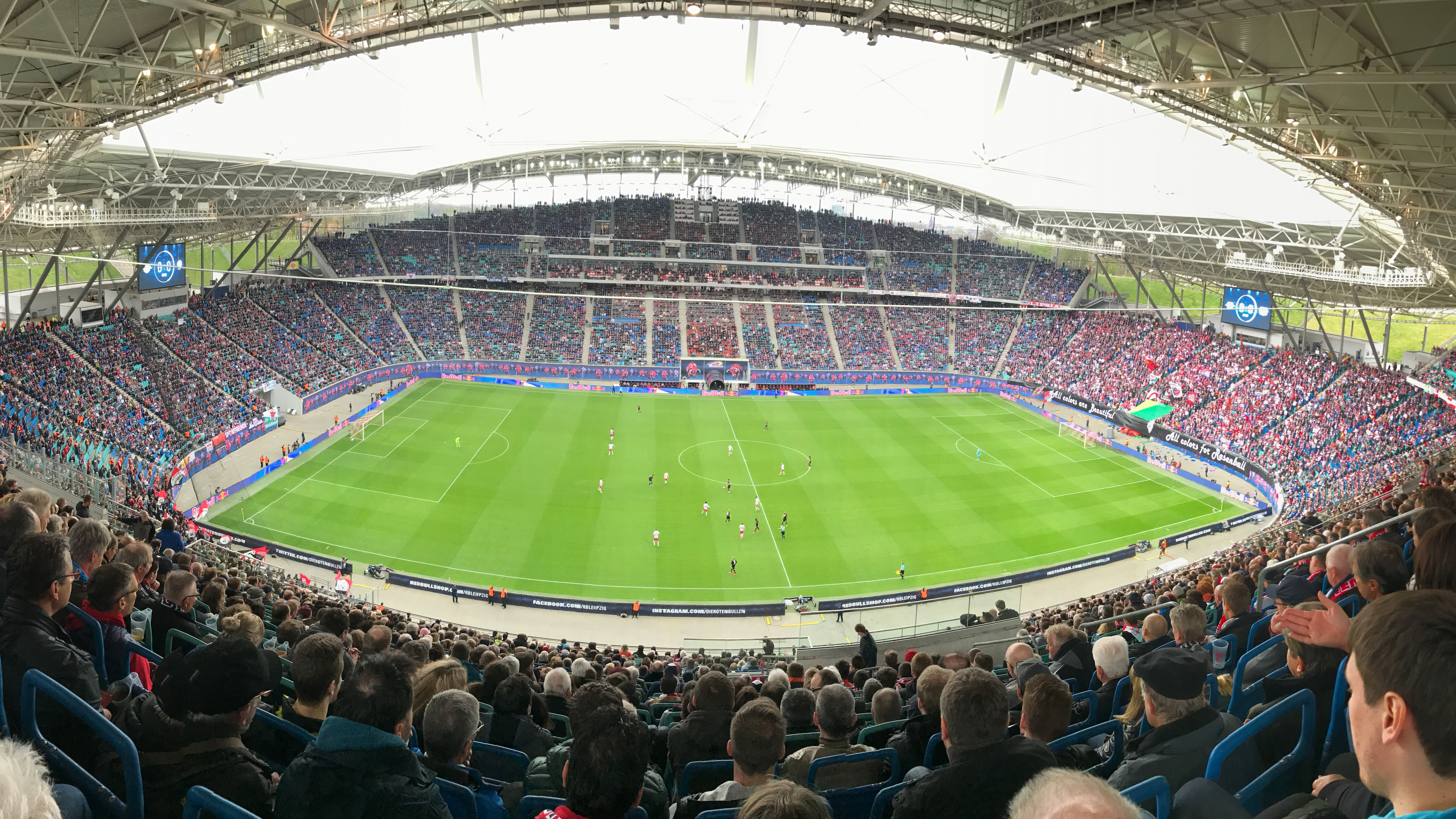 Innenansicht der Red Bull Arena Leipzig während der Bundesliga-Partie RB Leipzig - Bayer Leverkusen (1:0) am 8. April 2017